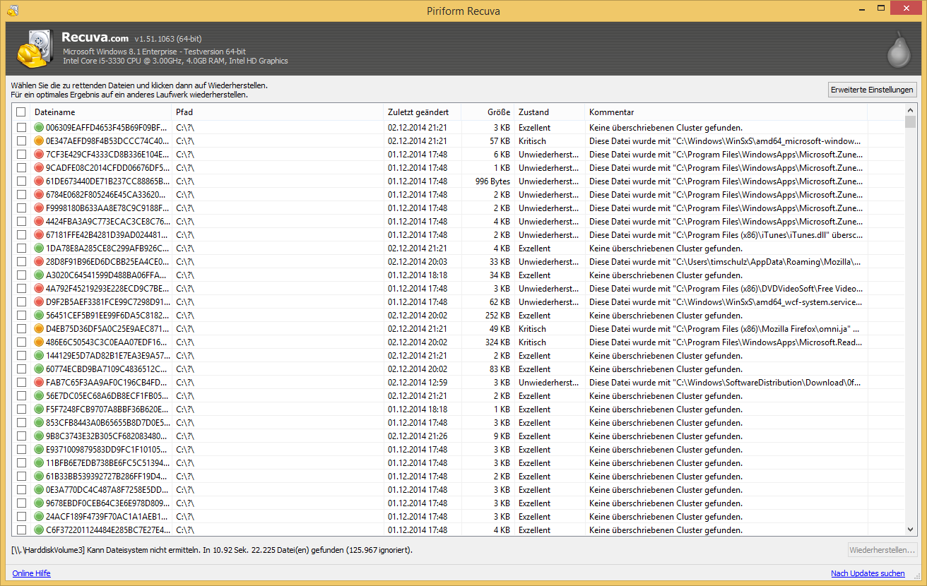 Recuva 1.51.1063 unter Windows 8.1